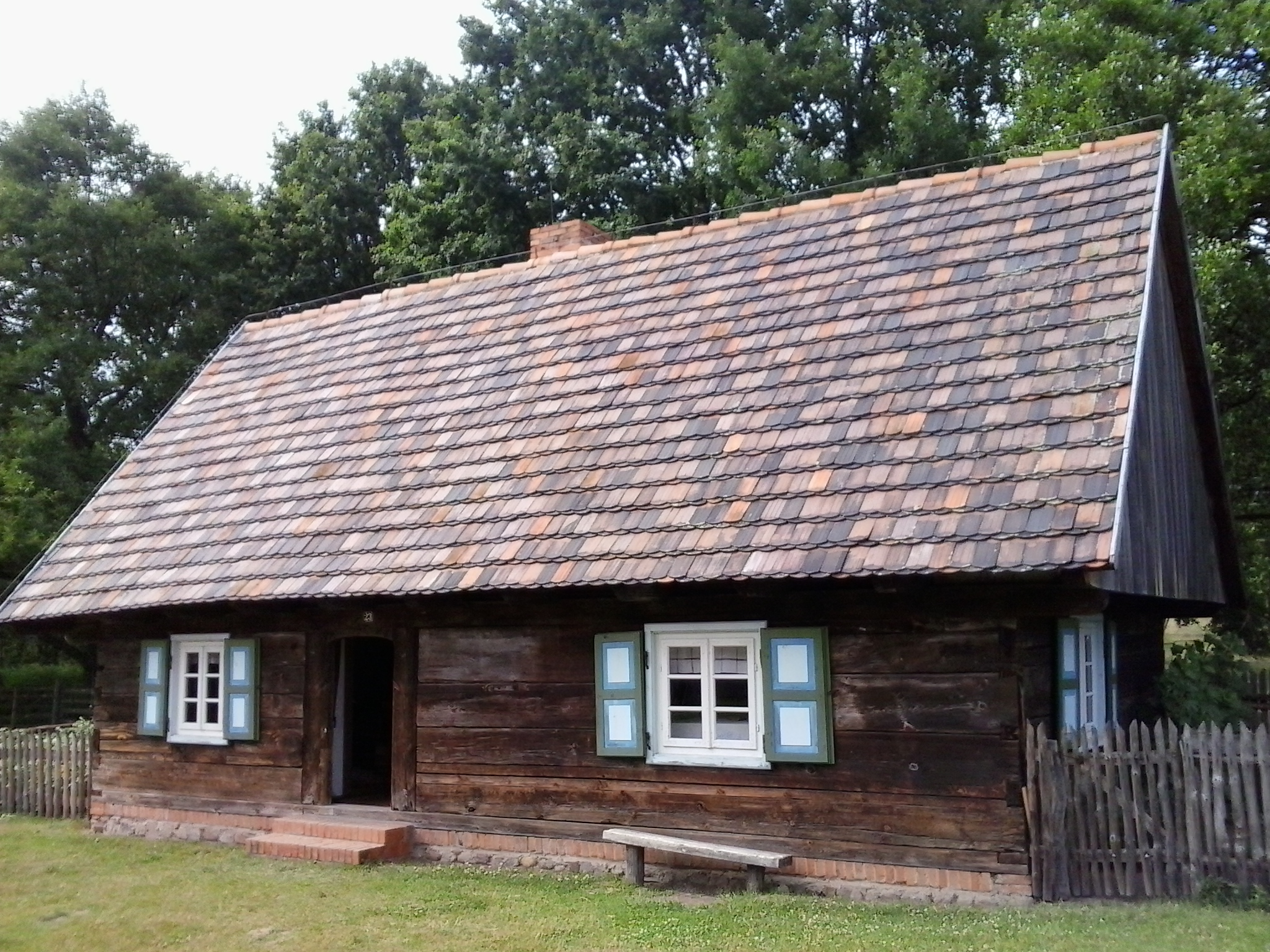 Wielkopolski Park Etnograficzny, Dziekanowice. Chałupa olęderska z okolic Nowego Tomyśla.